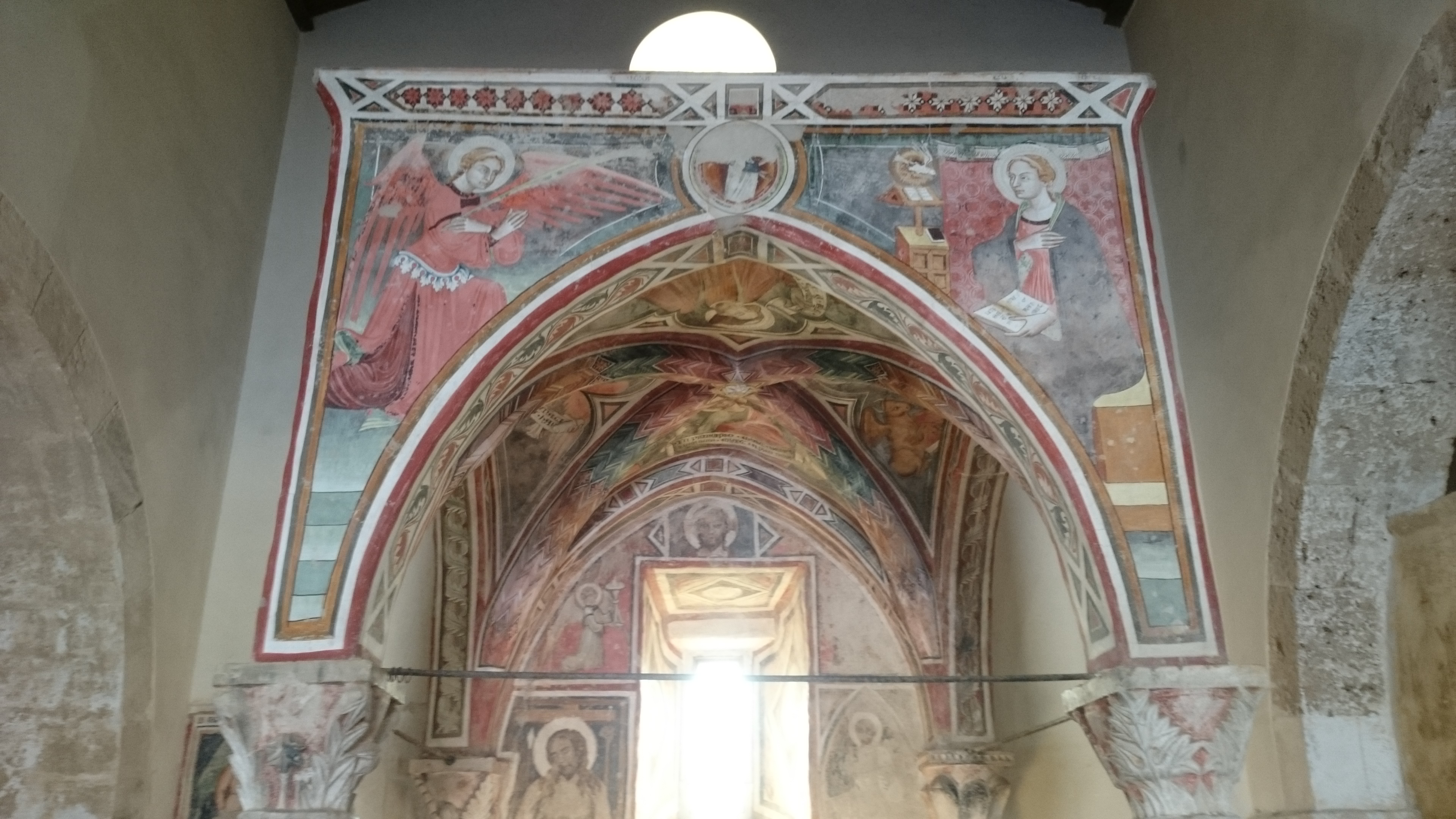 Vittorito (AQ): San Michele Arcangelo